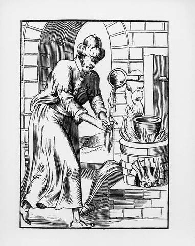 La mia foto di un'acquaforte che possiedo io che risale all'Ottocento